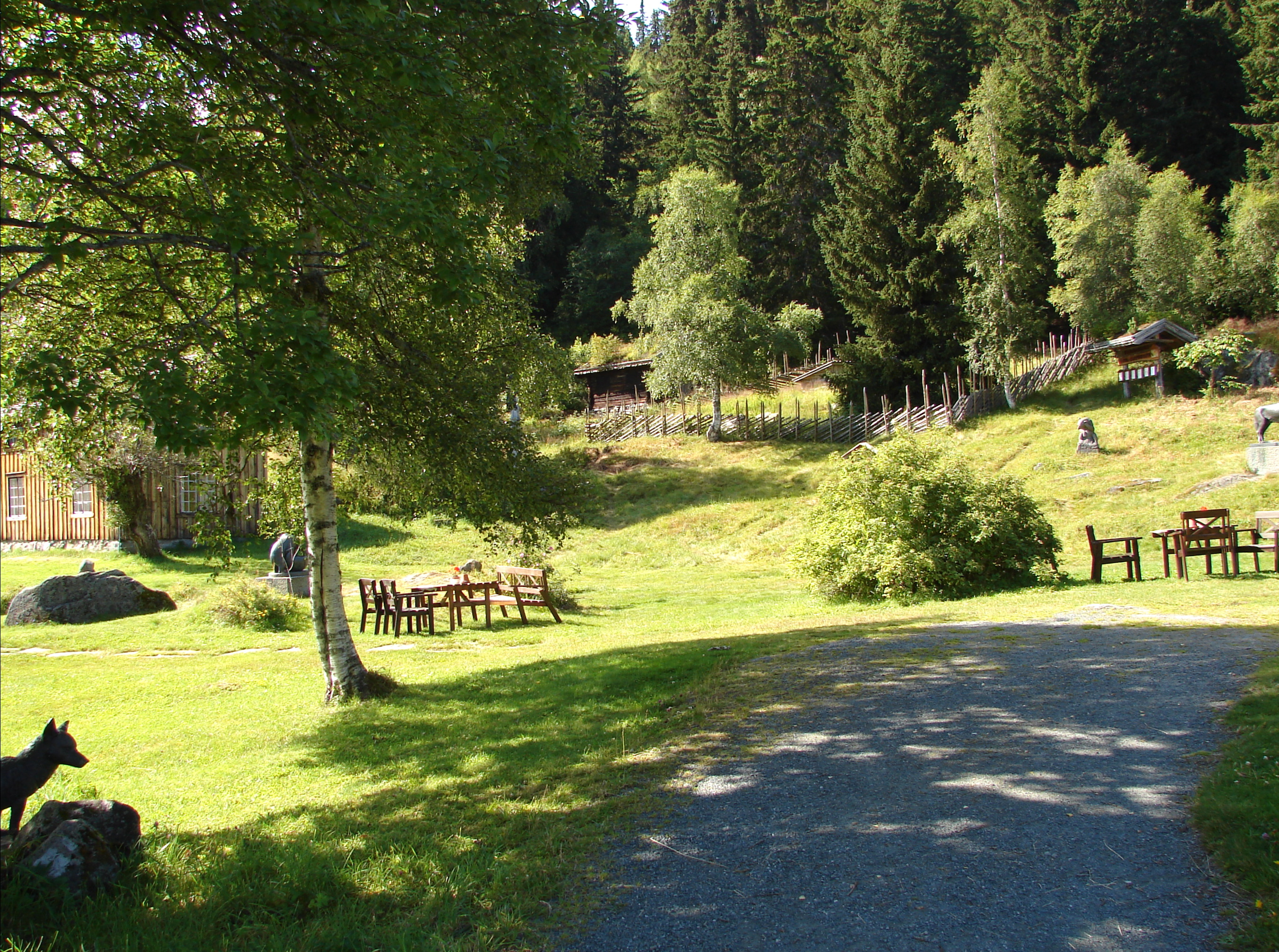 Udsnit af Grimdalstunet i Telemark